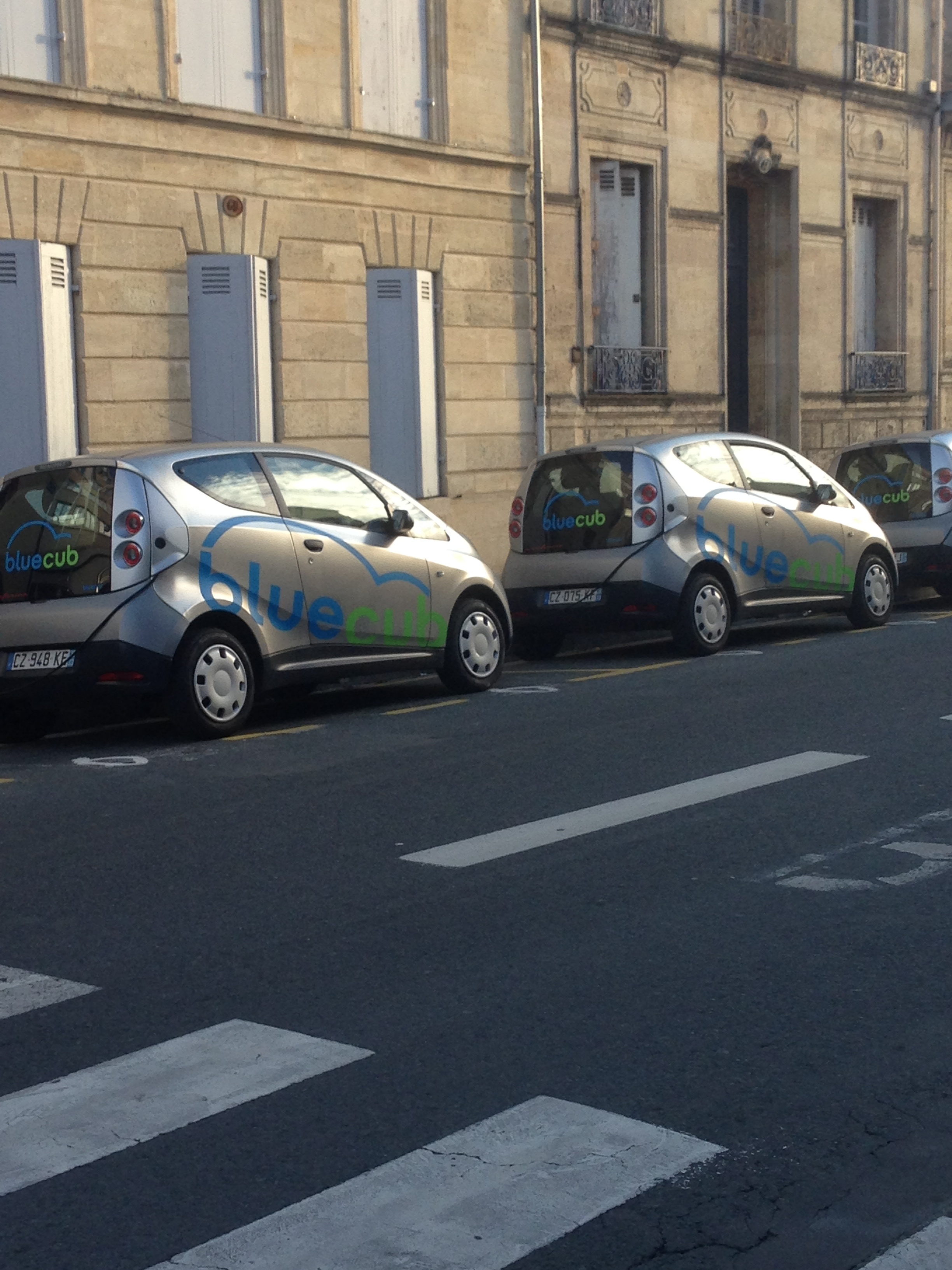 Les voitures électriques de Bolloré sont à Bordeaux.